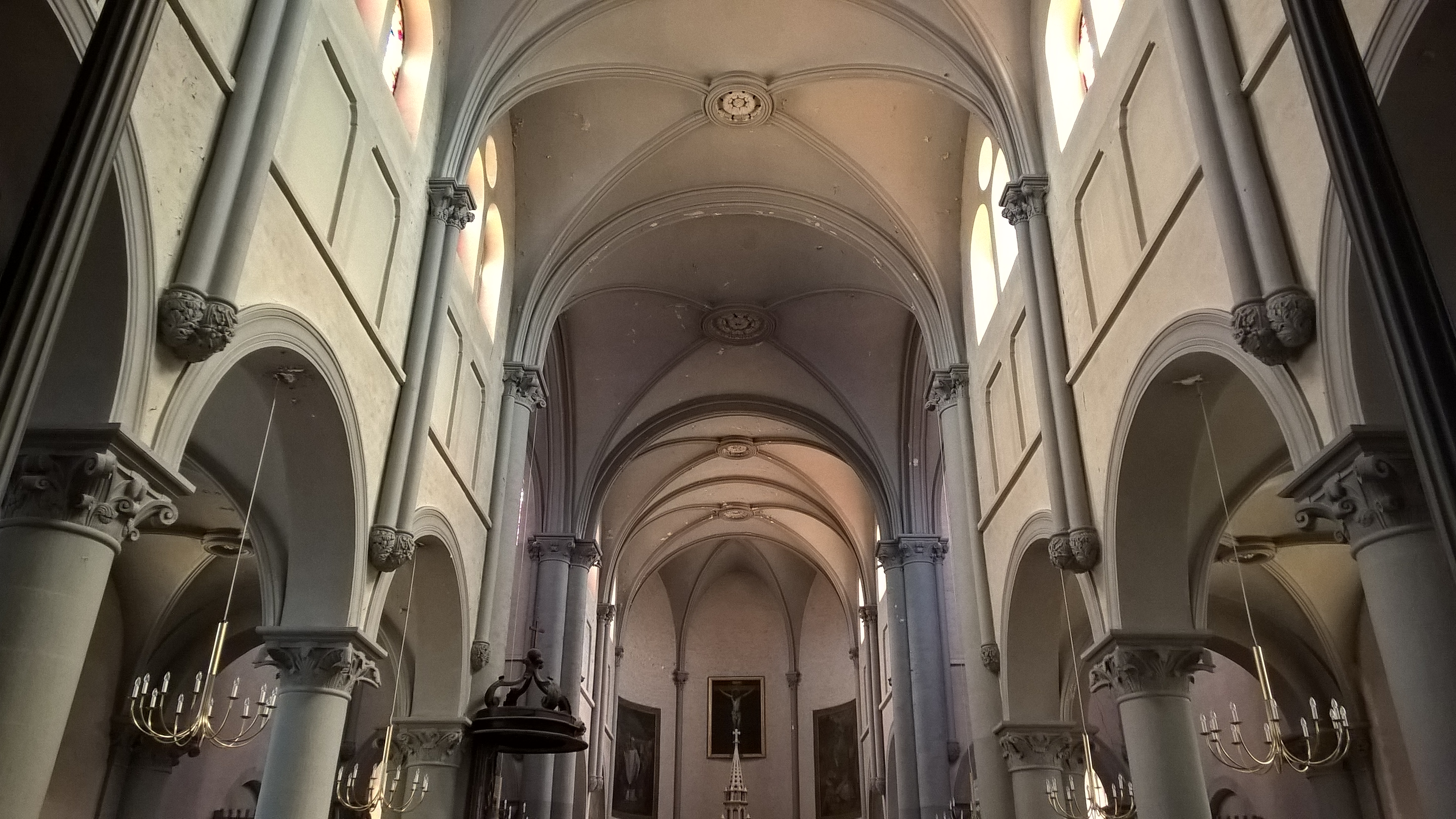 efefe